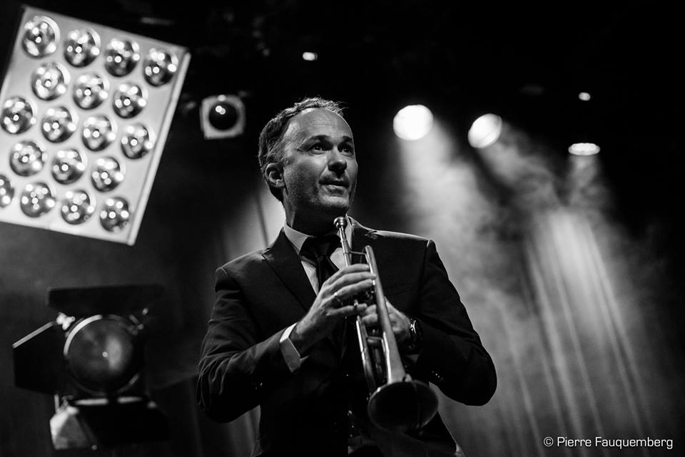 Nicolas Folmer sur la scène du Festival Blues sur Seine lors du concert de Lucky Peterson le 14.11.17 à Andrésy (France)